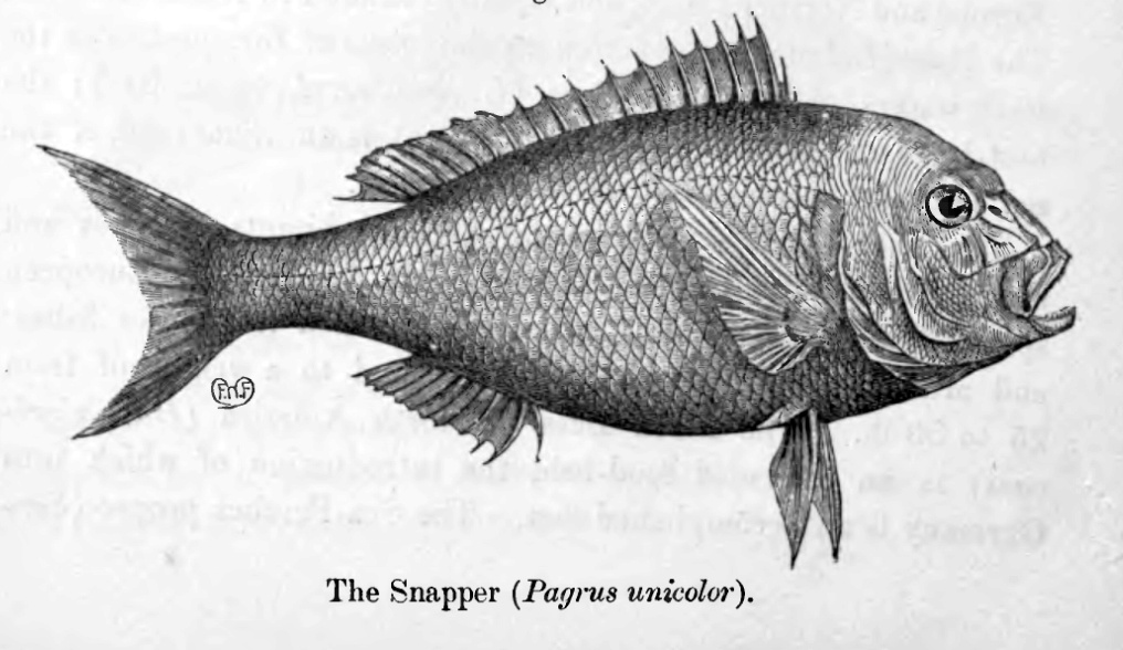 Chrysophrys auratus